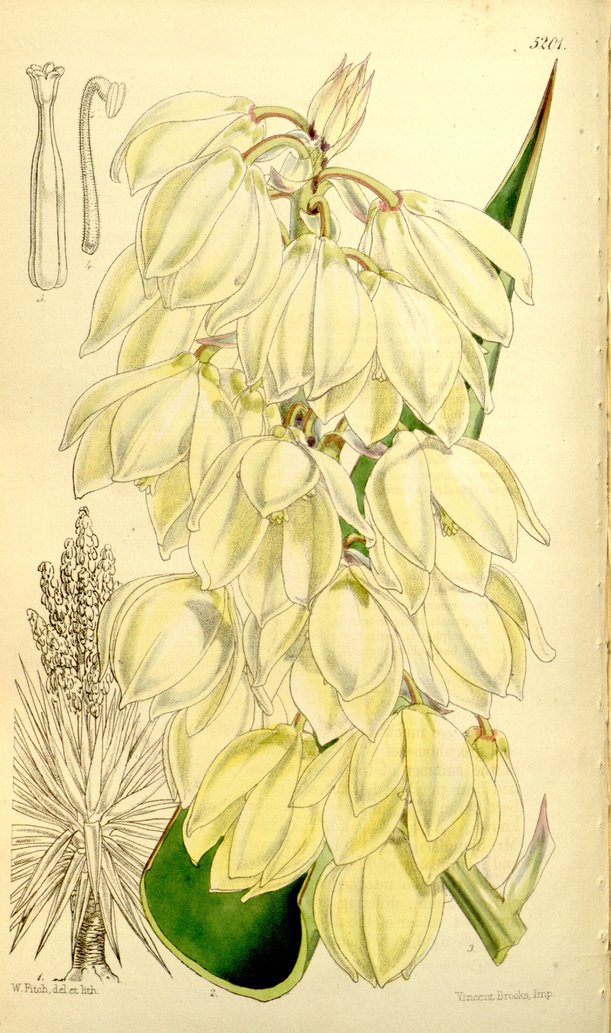 Yucca treculeana